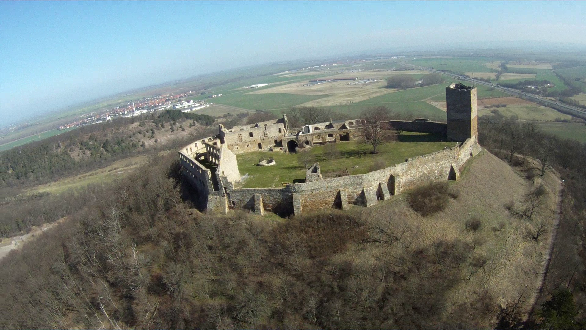 Burg Gleichen aufgenommen von Süden durch meinen Hexacopter